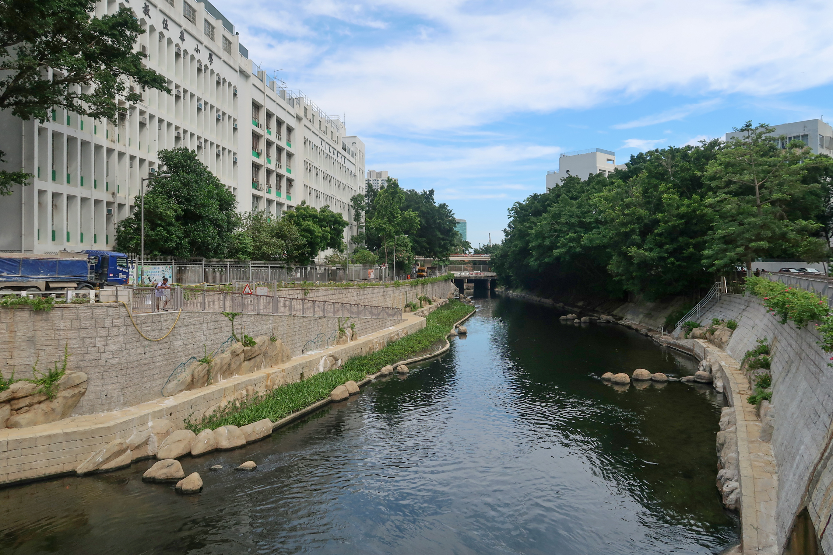 Kai Tak River